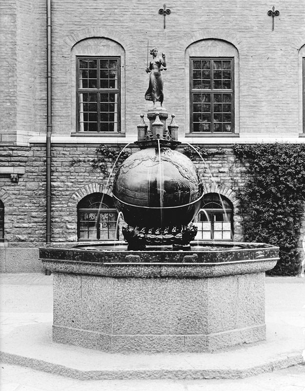 Justitiabrunnen Fotonummer FA 39037